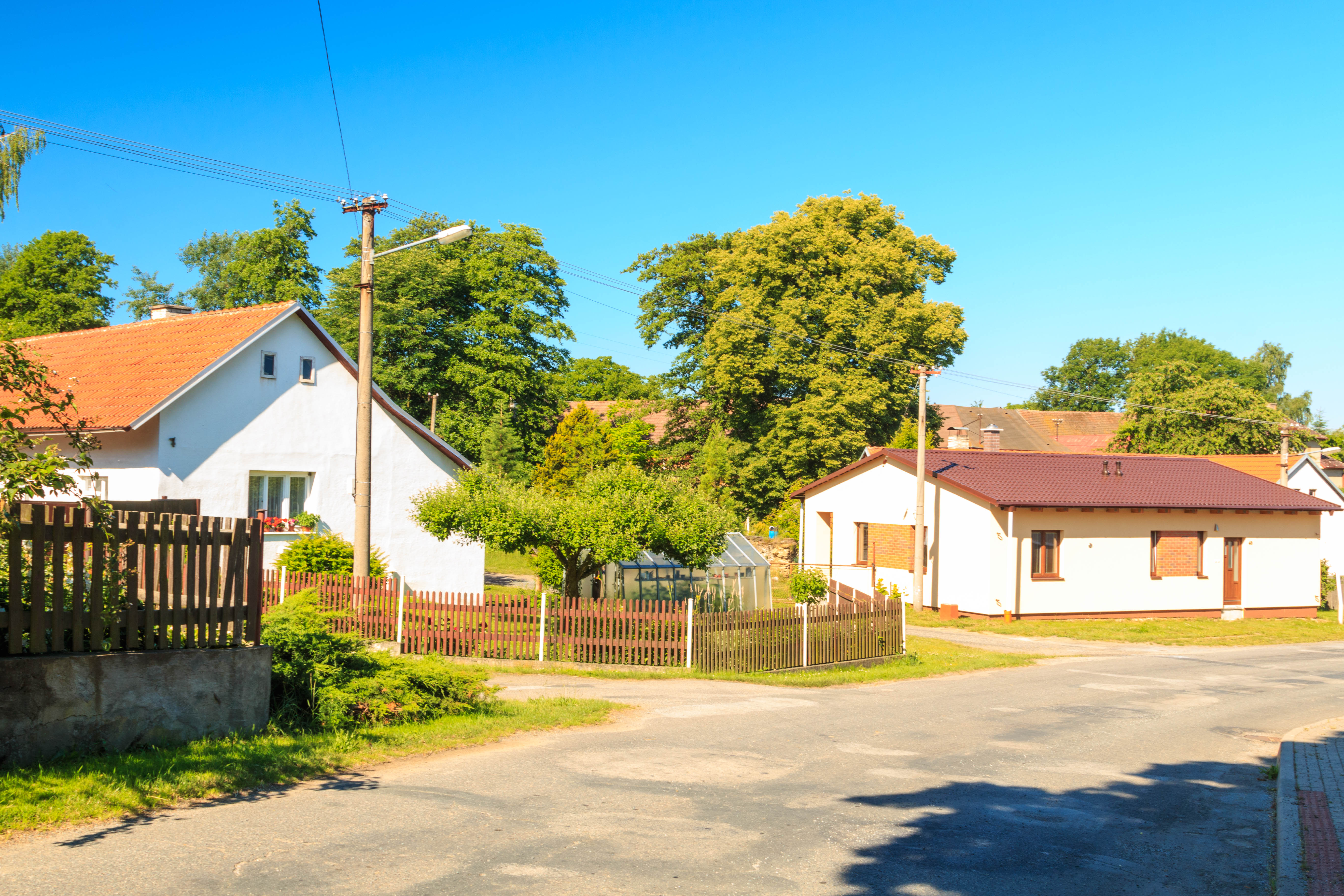 Rybníček u Havlíčkova Brodu čp. 7